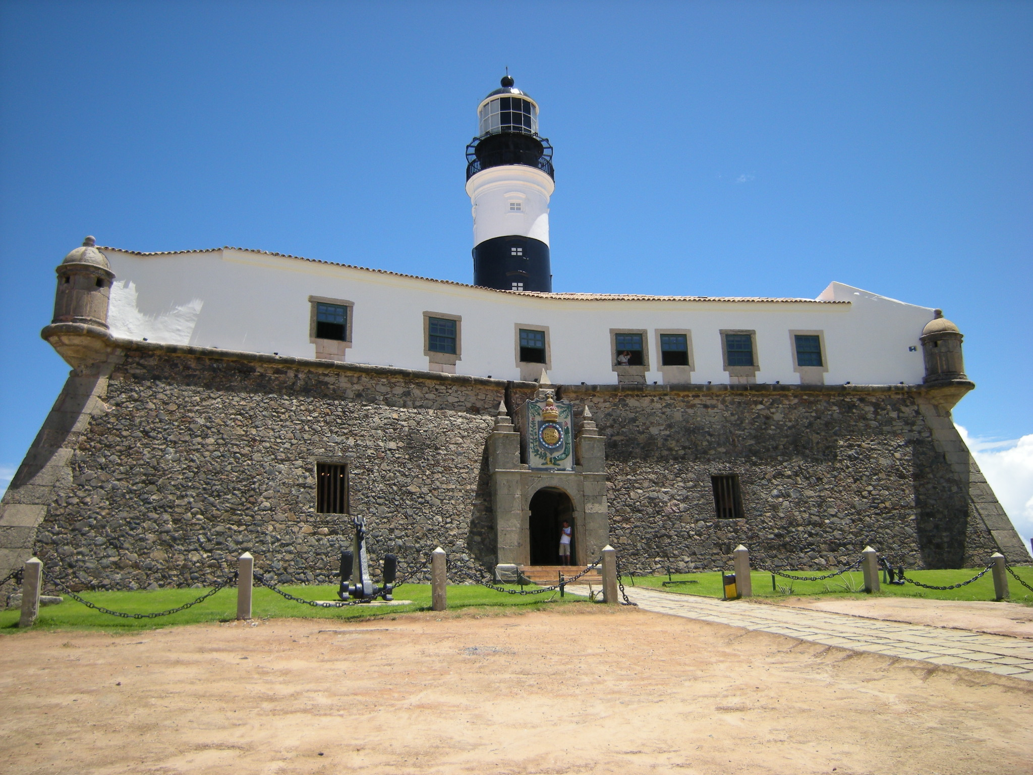 Salvador da Bahia, Brasil